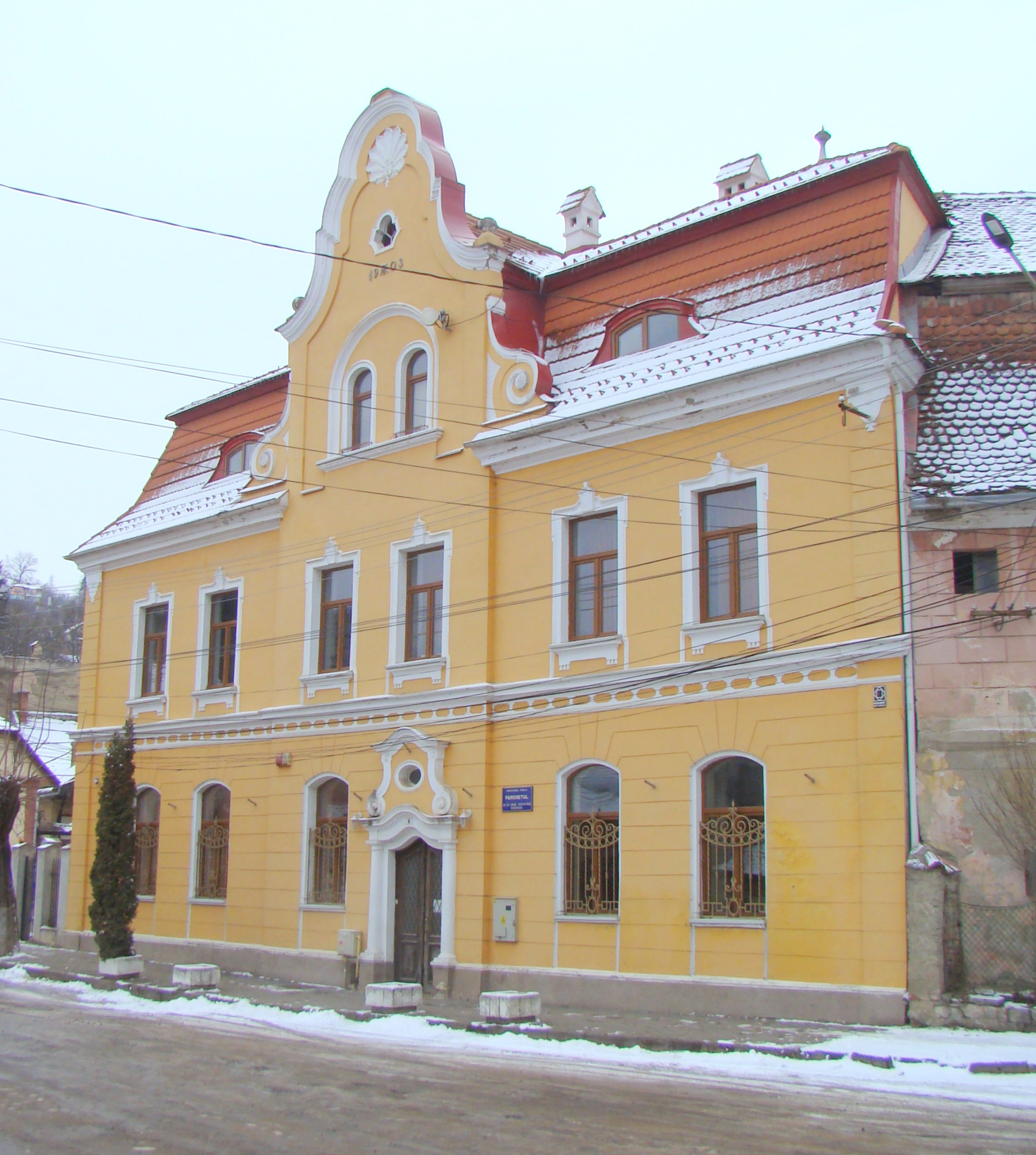 Clădirea Parchetului, municipiul Sighișoara, str. Bălcescu Nicolae 6 1903